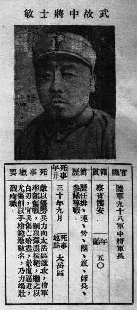 中文（台灣）: 抗戰軍人忠烈錄第一輯中的烈士遺像